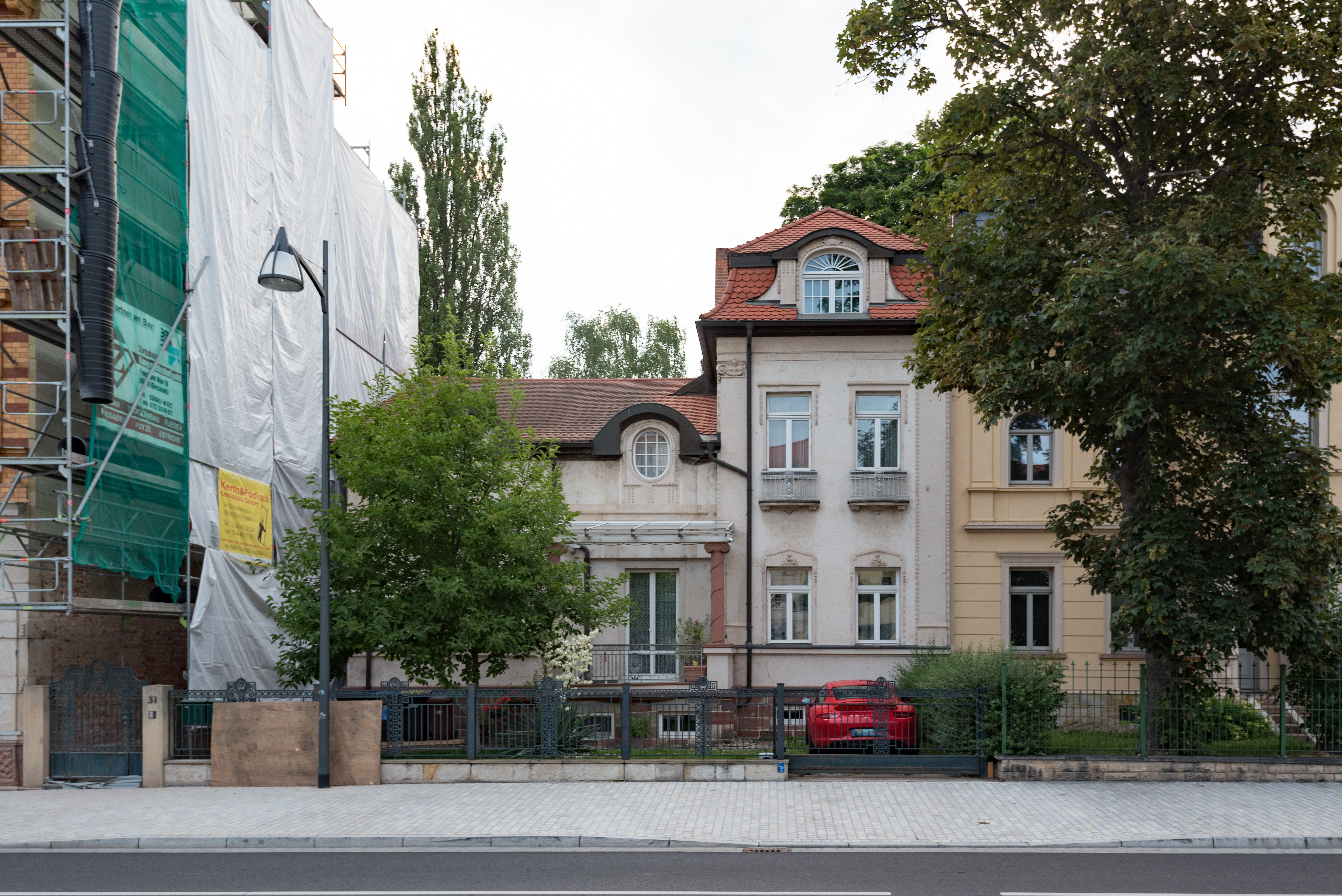 Weißenfels, Promenade 31